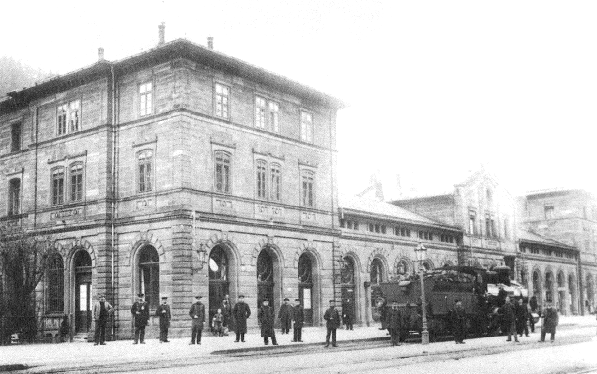 Bahnhof in Calw, Gleisseite.